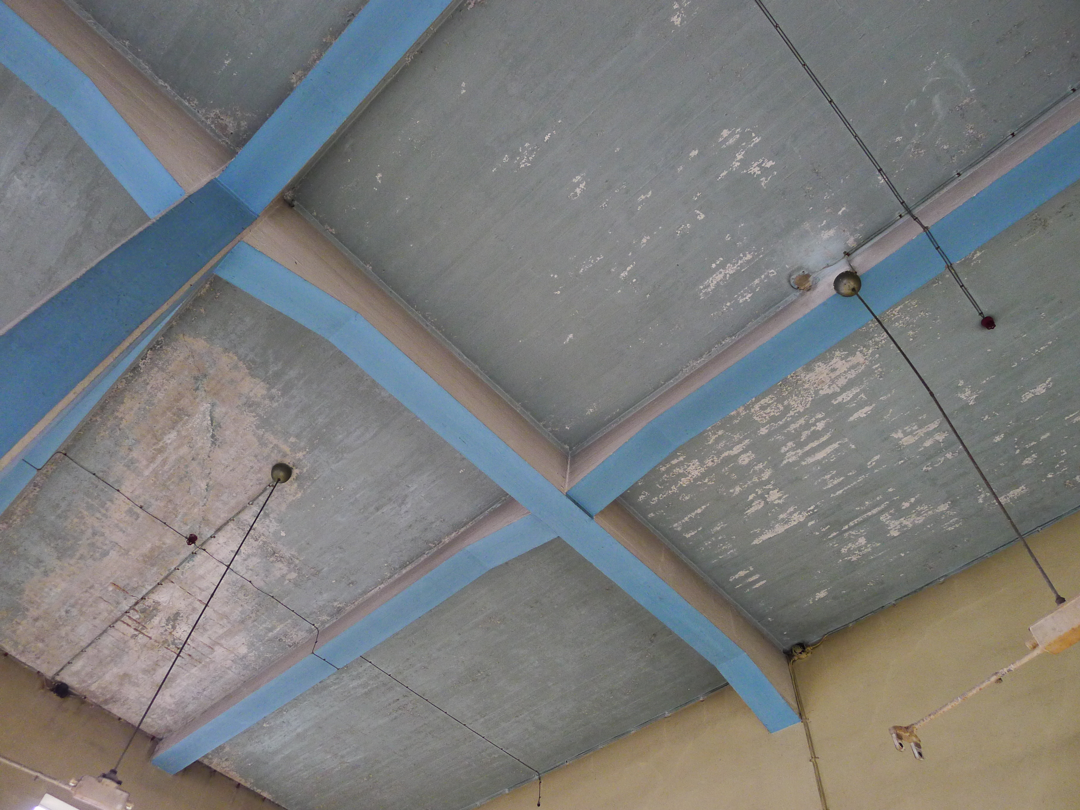 Skånska Yllefrabikens ställverksbyggnad i Kristianstad